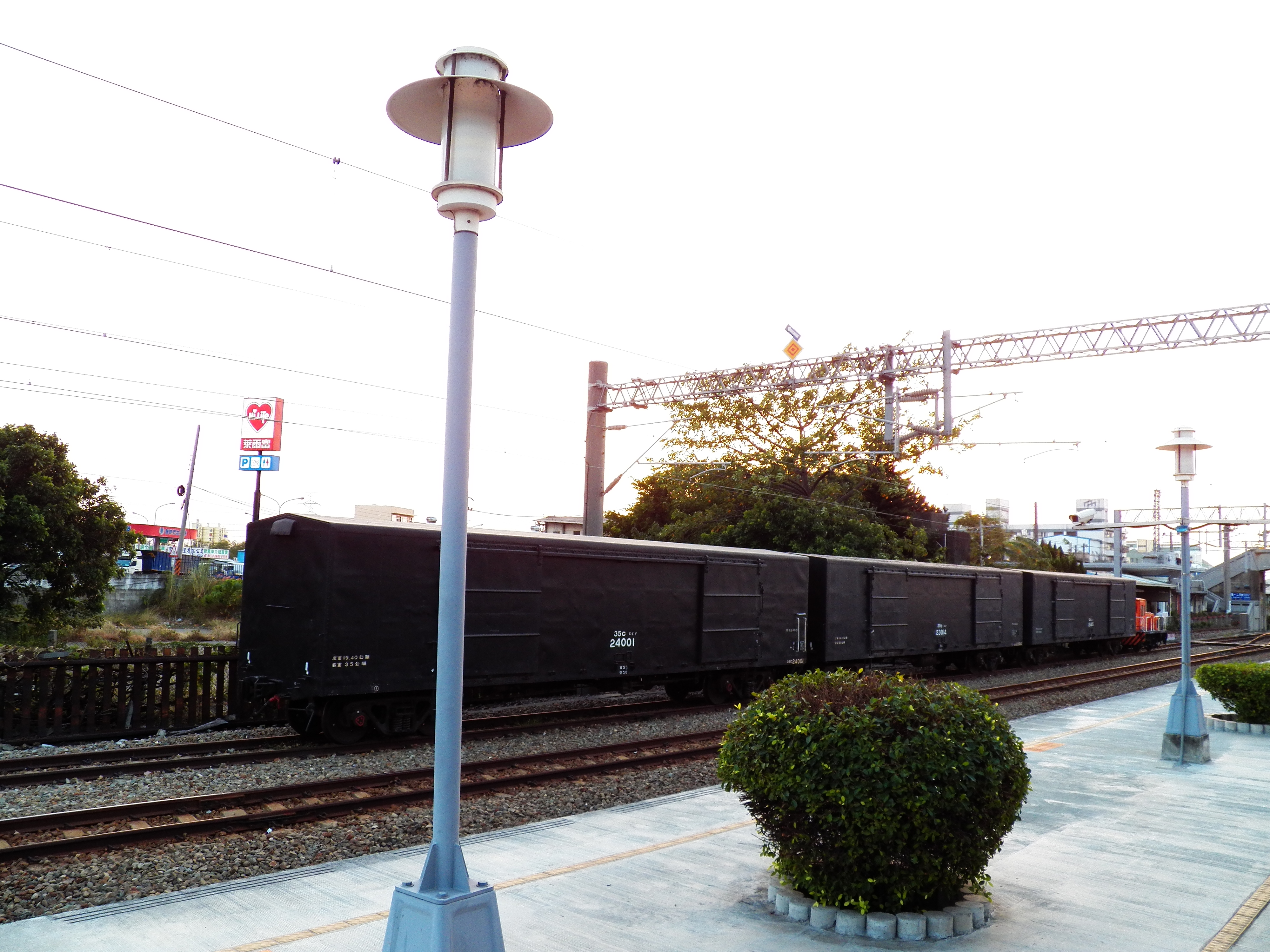 臺鐵成功站側線待避的貨車。